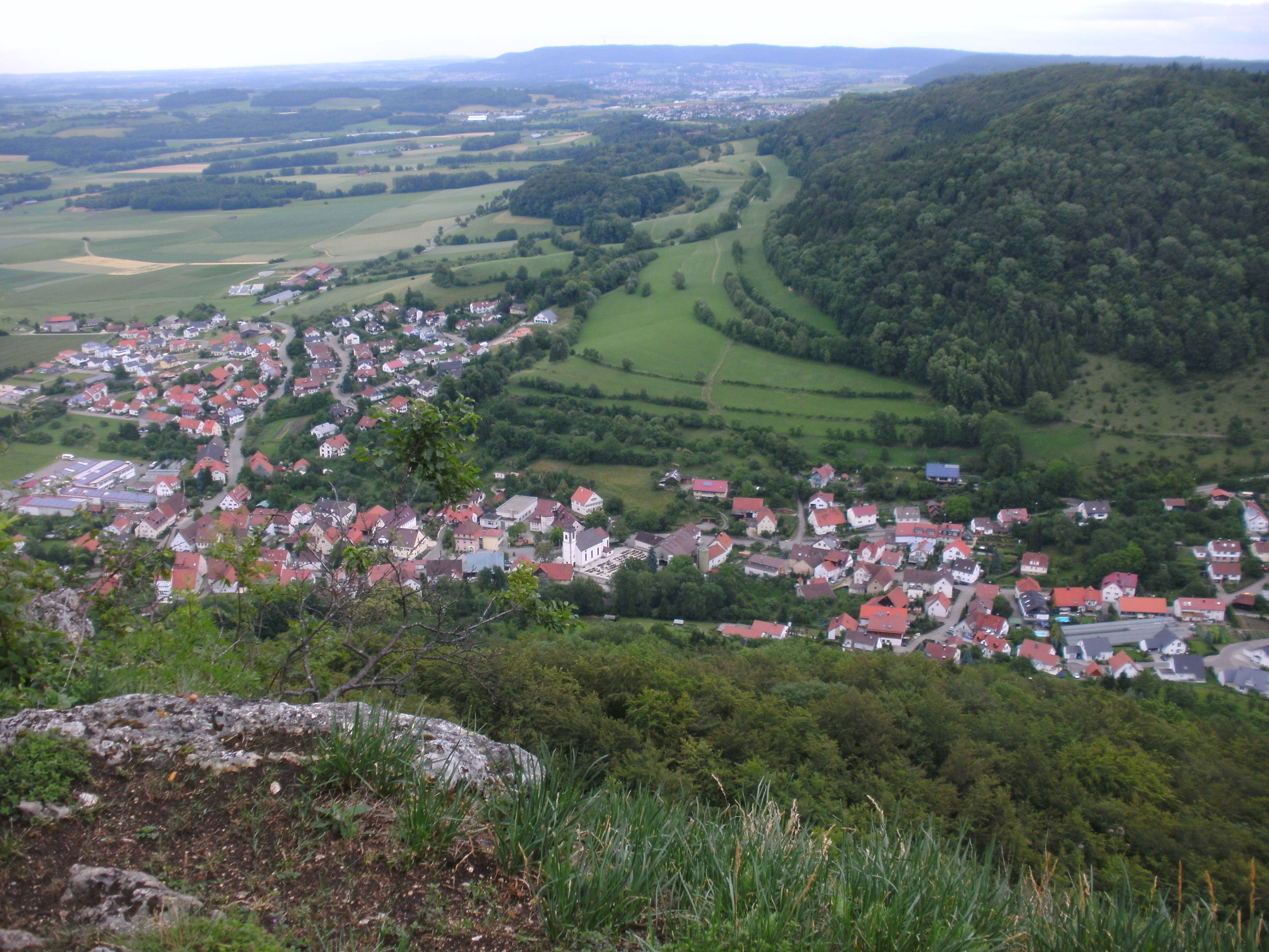 Blick auf den Stadtteil Lautern der Stadt Heubach im Ostalbkreis, vom Ostfelsen des Rosensteins.